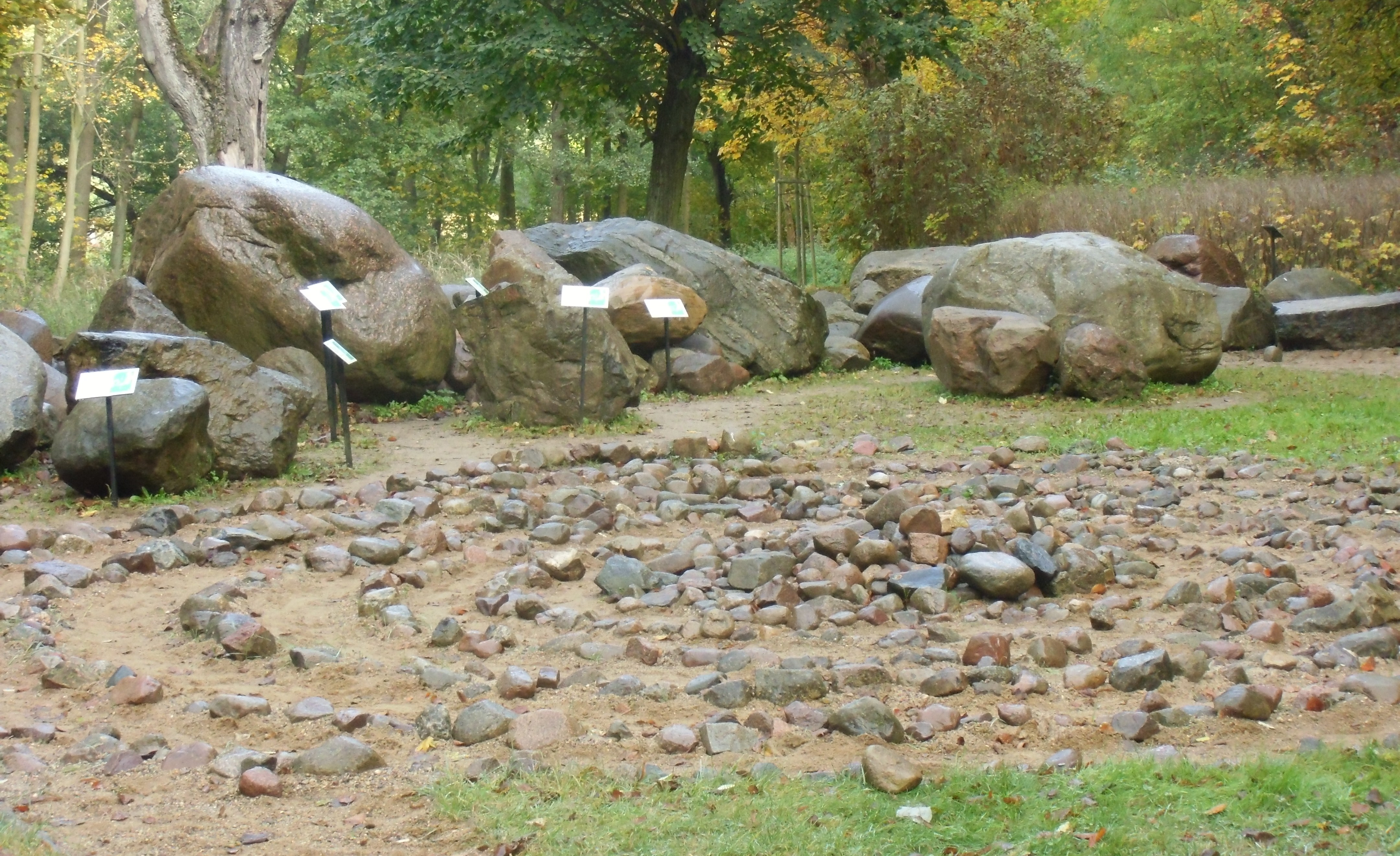 Der Eiszeitgarten in Buckow zeigt Findlinge aus Skandinavien und dem Ostseeraum, die in der Region von Buckow, im Thorn-Eberswalder-Urstromtal, gefunden wurden. Der größte Findling hat ein Gewicht von 11,2 Tonnen und stammt aus dem nördlichen Mittelschweden.